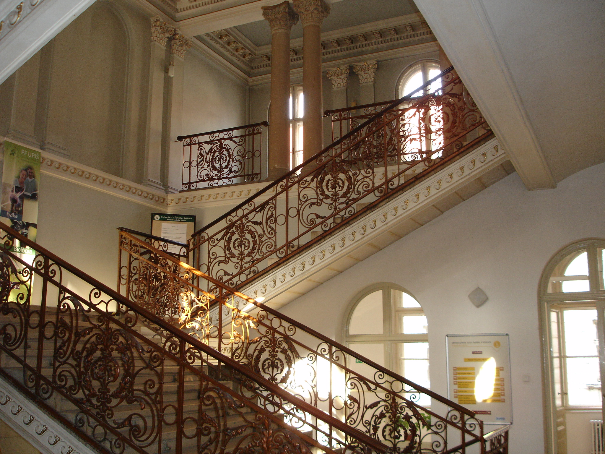 Schodište v budove rektorátu UPJŠ v Košiciach